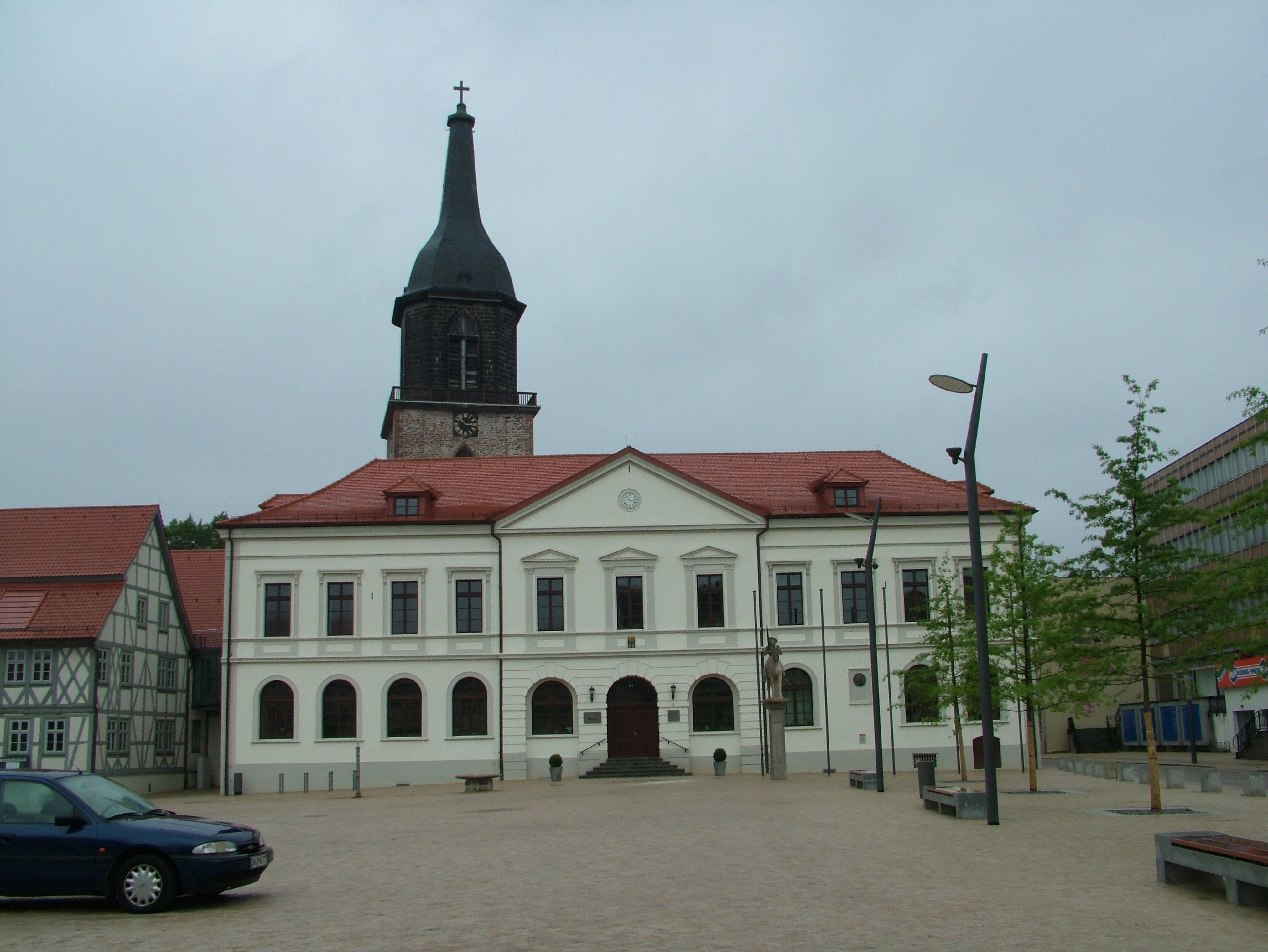 Haldensleben, Sachsen-Anhalt, Deutschland, Das Rathaus mit Roland